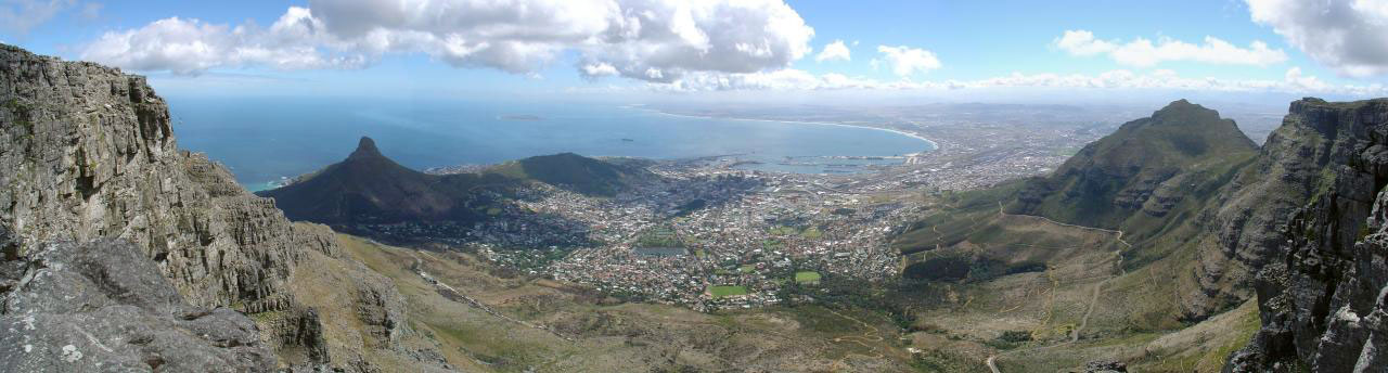 Kapstad-Panorama.